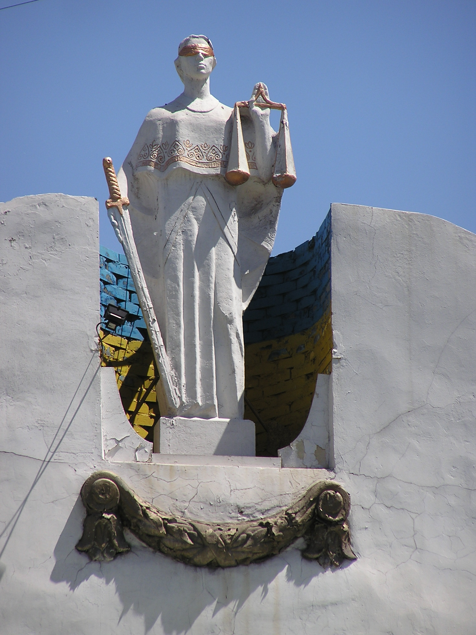 Донецк. Фемида